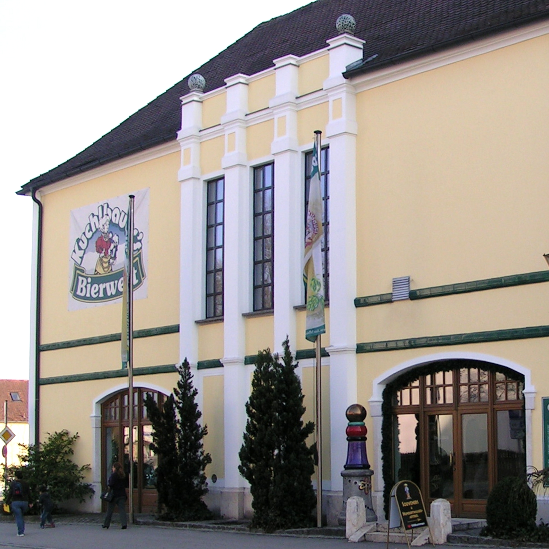 Brauereigebäude der Brauerei Kuchlbauer, Stadt Abensberg, Landkreis Kelheim, Niederbayern